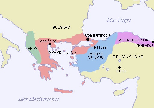 Los estados herederos del Imperio Bizantino hacia 1204.